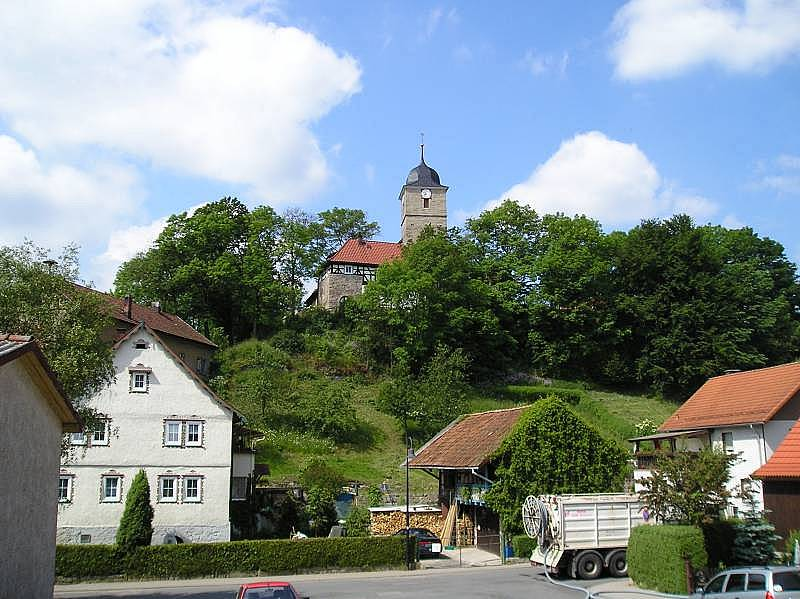 Gemeinde Utendorf bei Meiningen in Thüringen